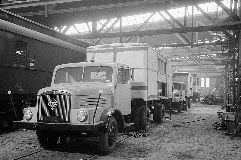 Original image description from the Deutsche Fotothek Vorderansicht eines IFA-Lastkraftwagens H3A mit Fahrzeugaufbau